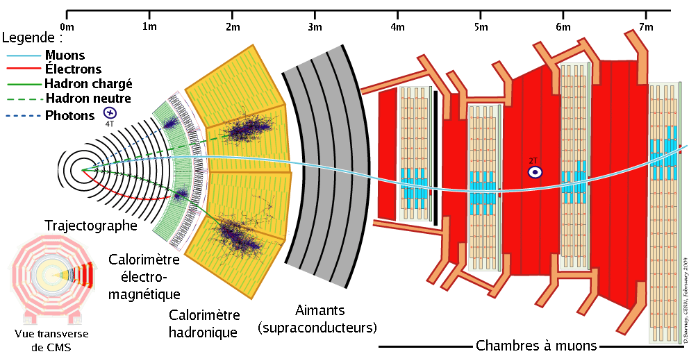 Picture that represent a transverse slice of the CMS detector (french conversion) Image représentant une coupure transverse du détecteur CMS (avec légende en français)